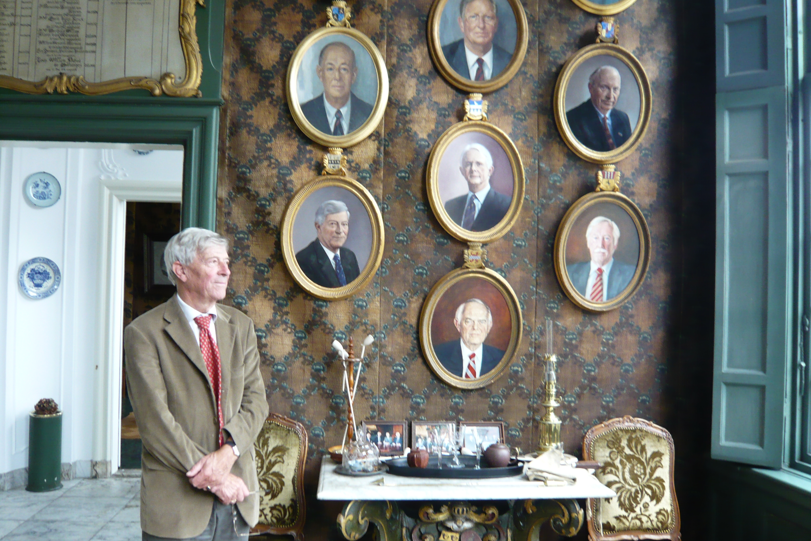 Haarlem, Hofje van Noblet, Regent Jacques Boeré naast zijn portet in de regentenkamer, Hooimarkt, Haarlem.